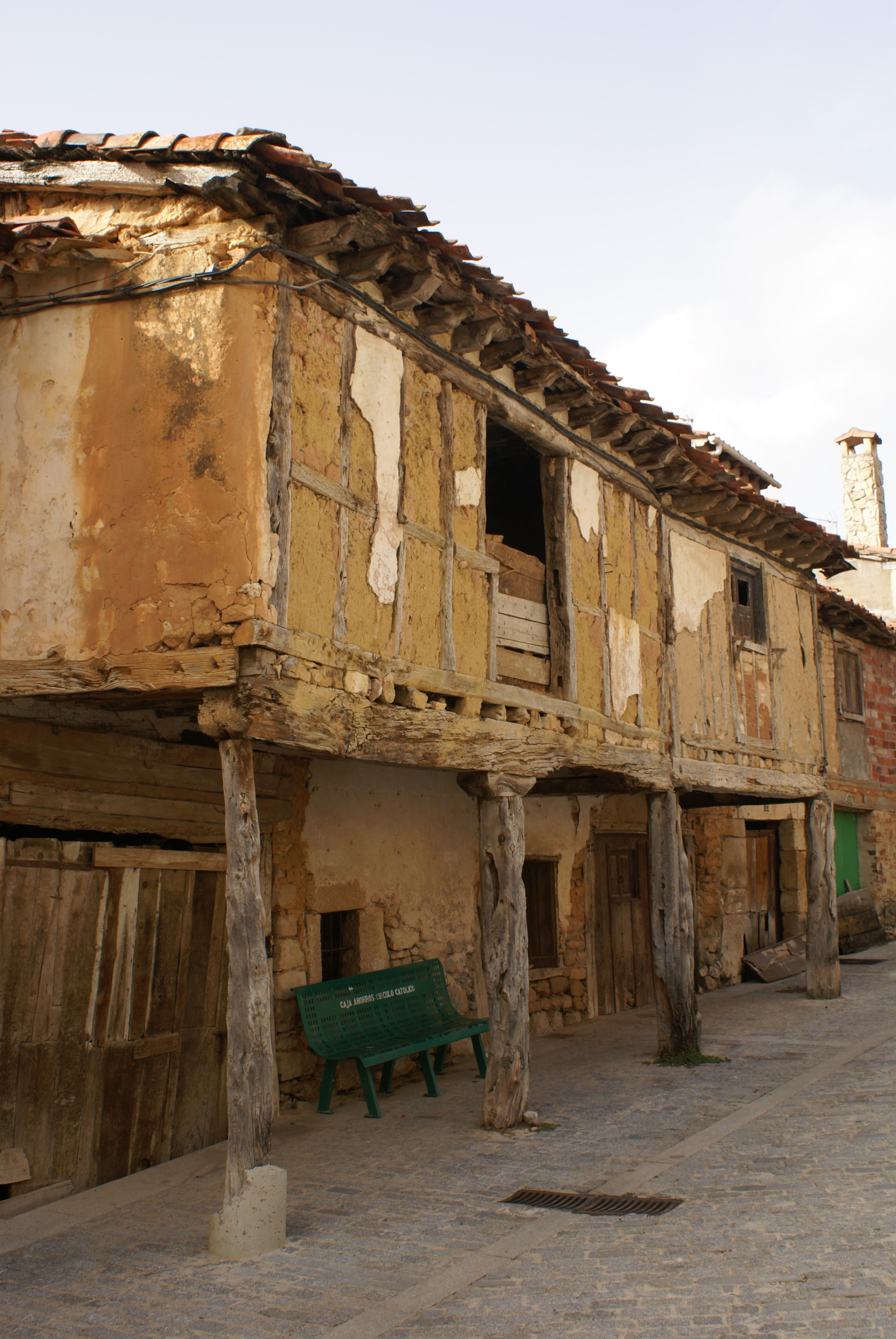 Soportales castellanos de unas casas semihundidas en Santo Domingo de Silos, Burgos.